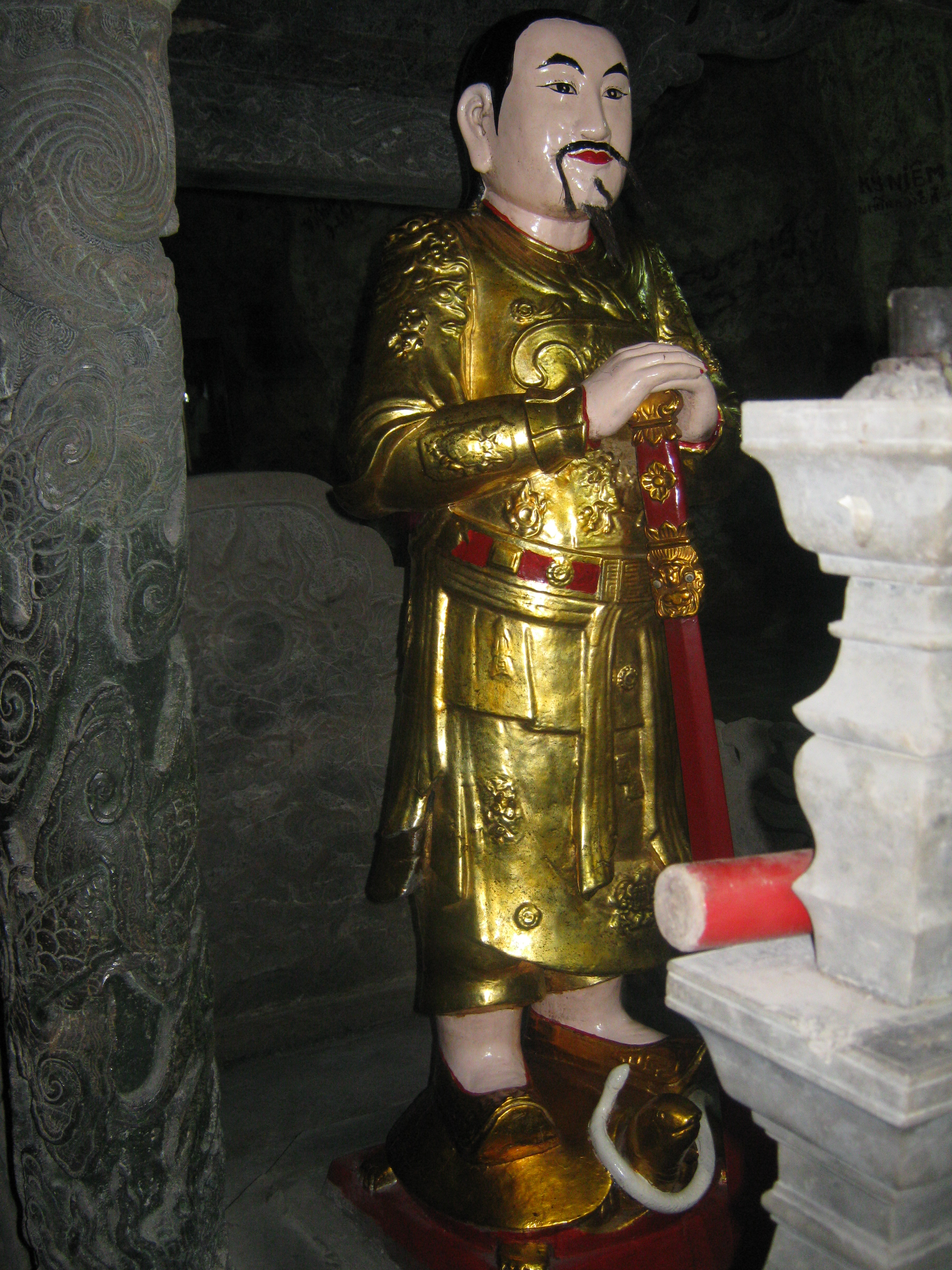 Ảnh chụp tại khu di tích cố đô Hoa Lư tỉnh Ninh Bình